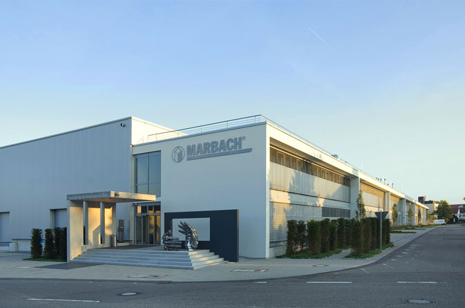 Marbach-Firmengebäude am Stammsitz in Heilbronn